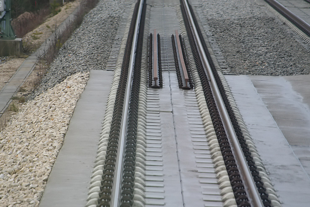 Übergang zwischen Fester Fahrbahn und herkömmlichem Schotteroberbau, mit Beischienen und teils verklebtem Schotter